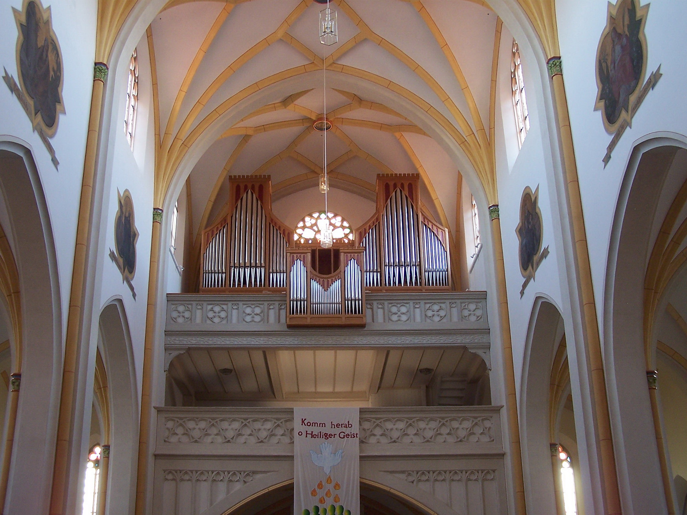 Pfeffenhausen, Kirchplatz 16. Katholische Pfarrkirche St. Martin. Neugotische Basilika, Blankziegelbau, nach Planung des königlichen Baumamtmanns Anton Völkl, 1885-87. Zweigeschossige Empore mit Jann Orgel aus dem Jahr 1988.